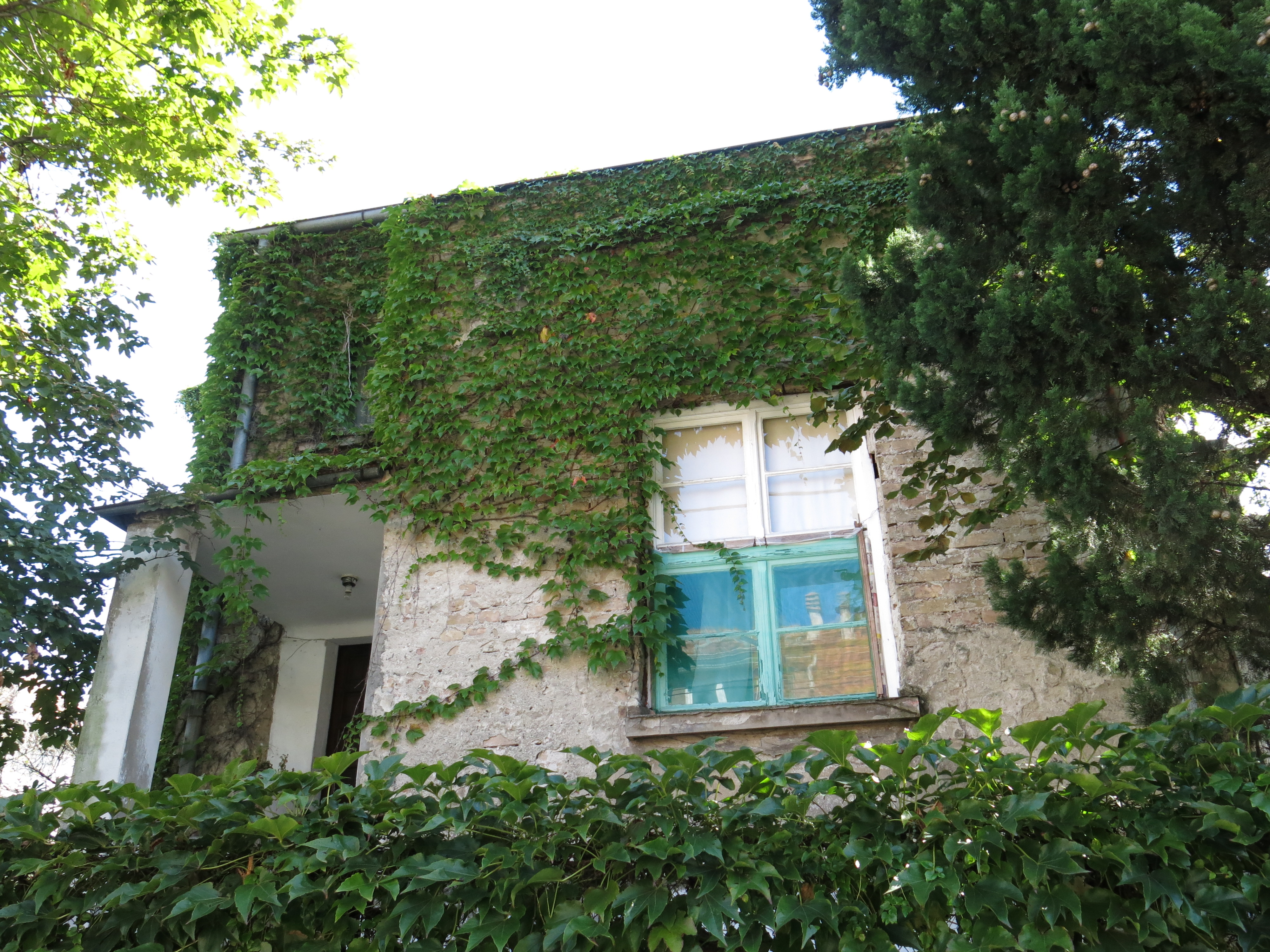 Кућа Драгољуба Гошића